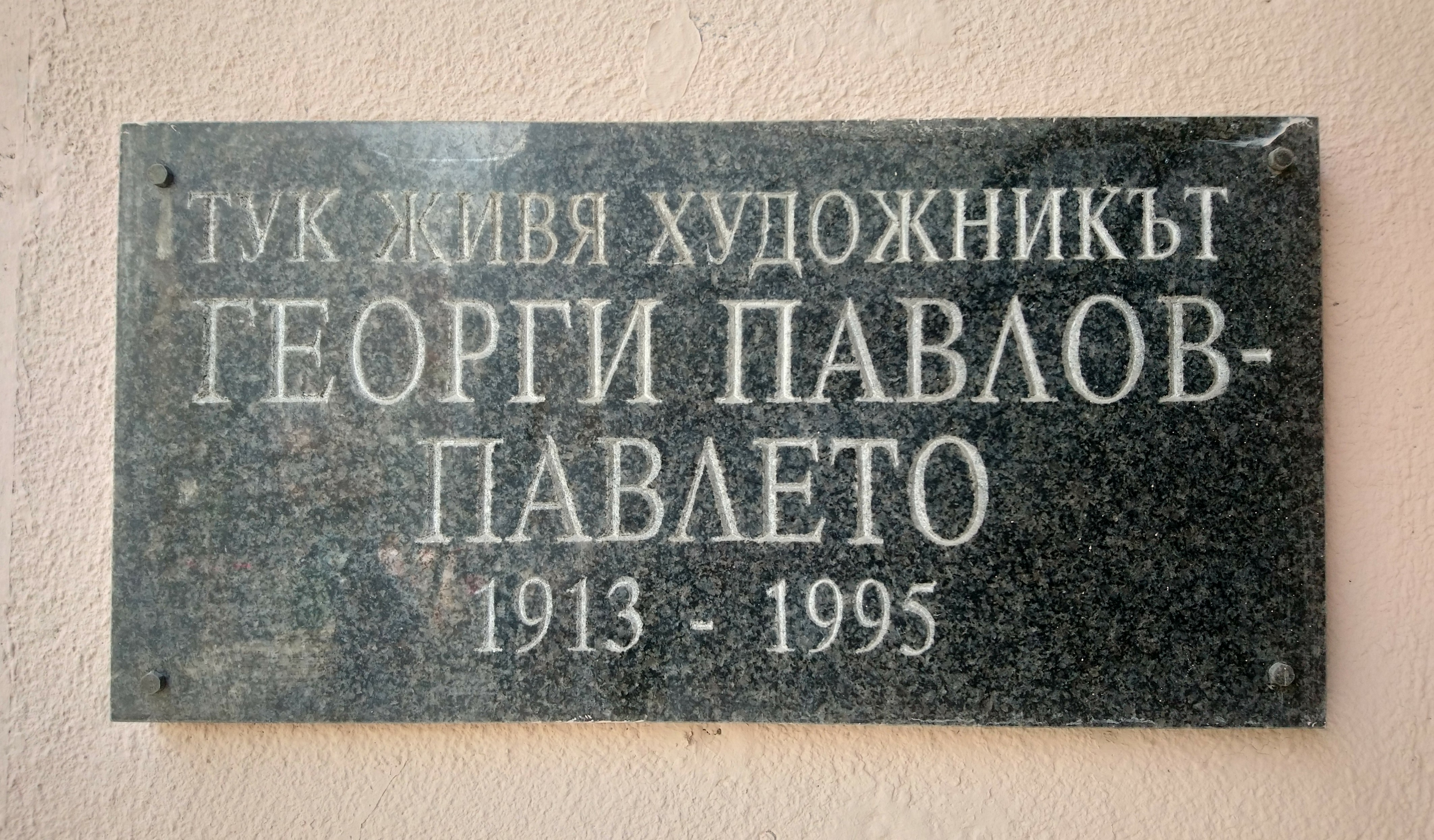 Паметна плоча на художника Георги Павлов - Павлето, ул. Раковски 86А, София